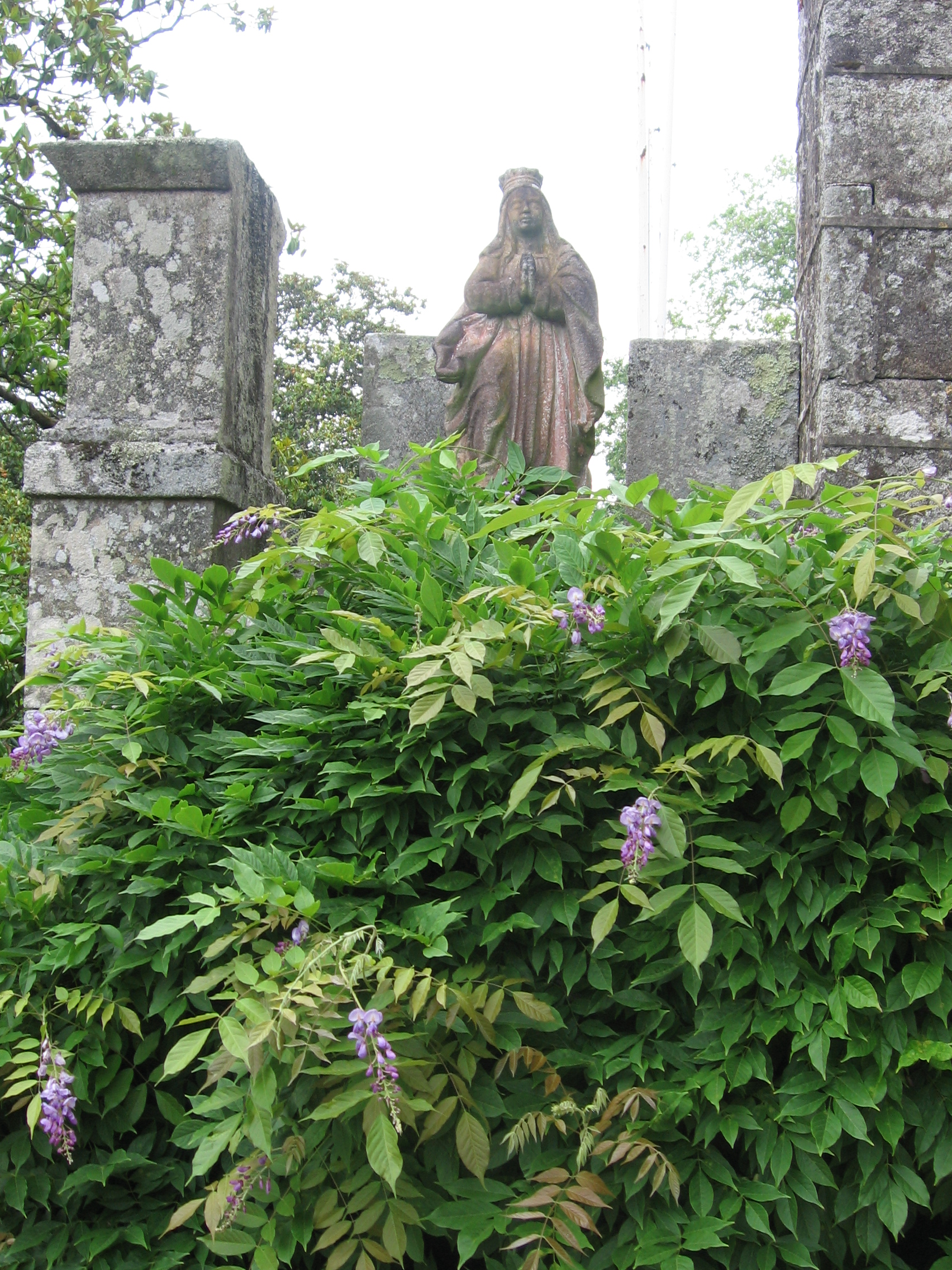 Glicínia e a Virge, Castrelos, Vigo